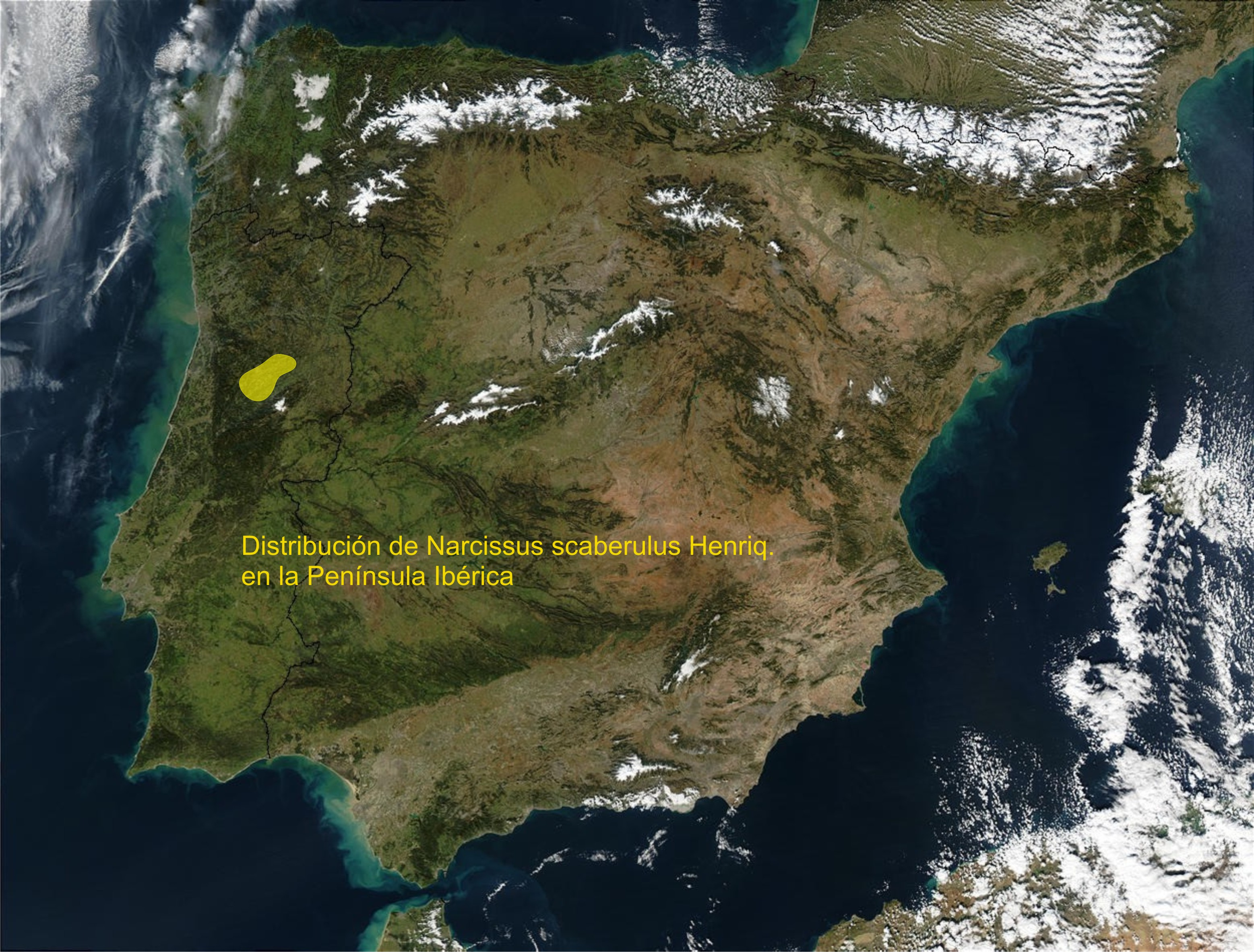 Área de distribución de Narcissus scaberulus Henriq. en la Península Ibérica